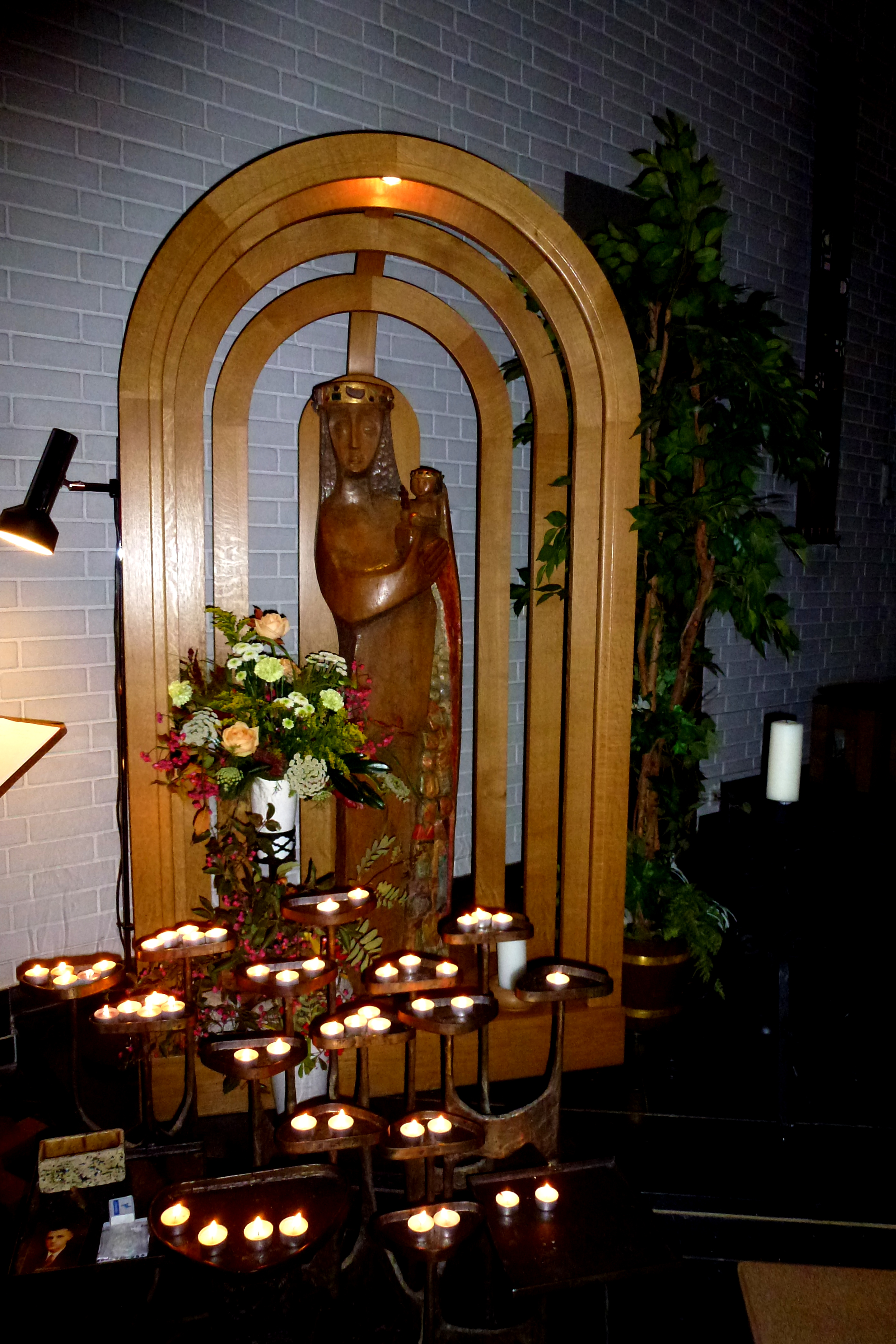 St.Augustinus Willingen Madonna